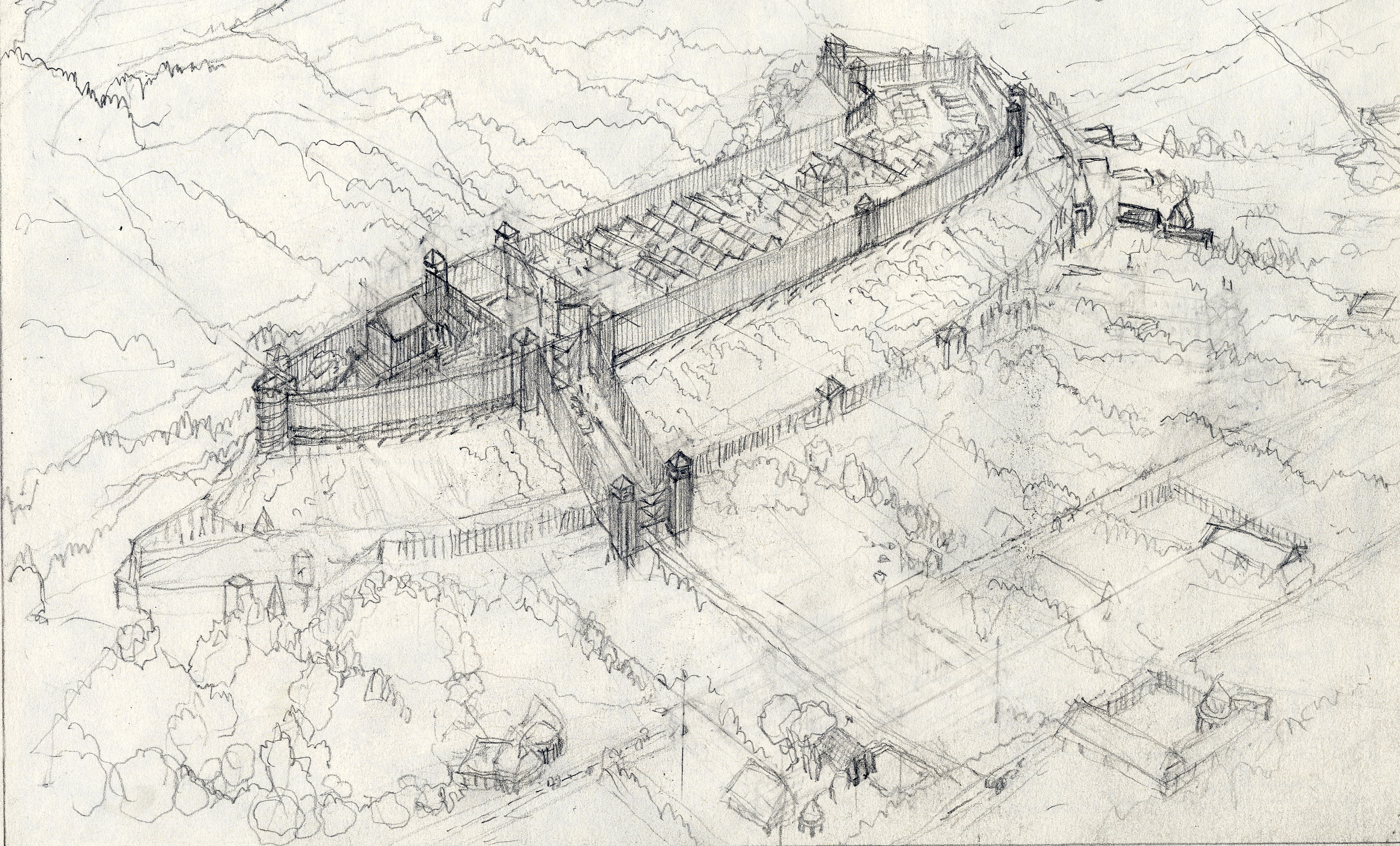 Vue d'artiste sur oppidum de Montsaon, reconstitution